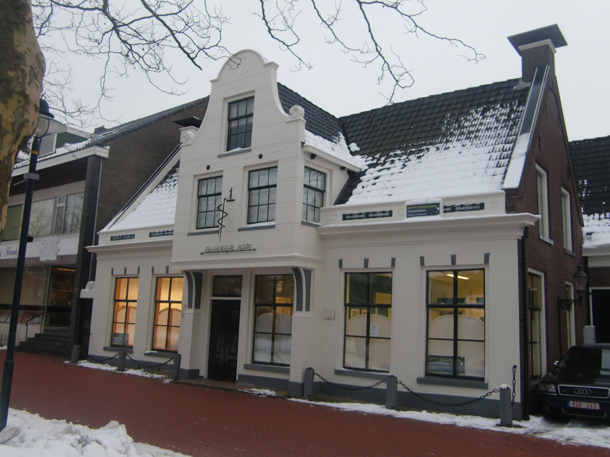 Rijksmonument: Bleekerhûs te Drachten. (Foto 3)